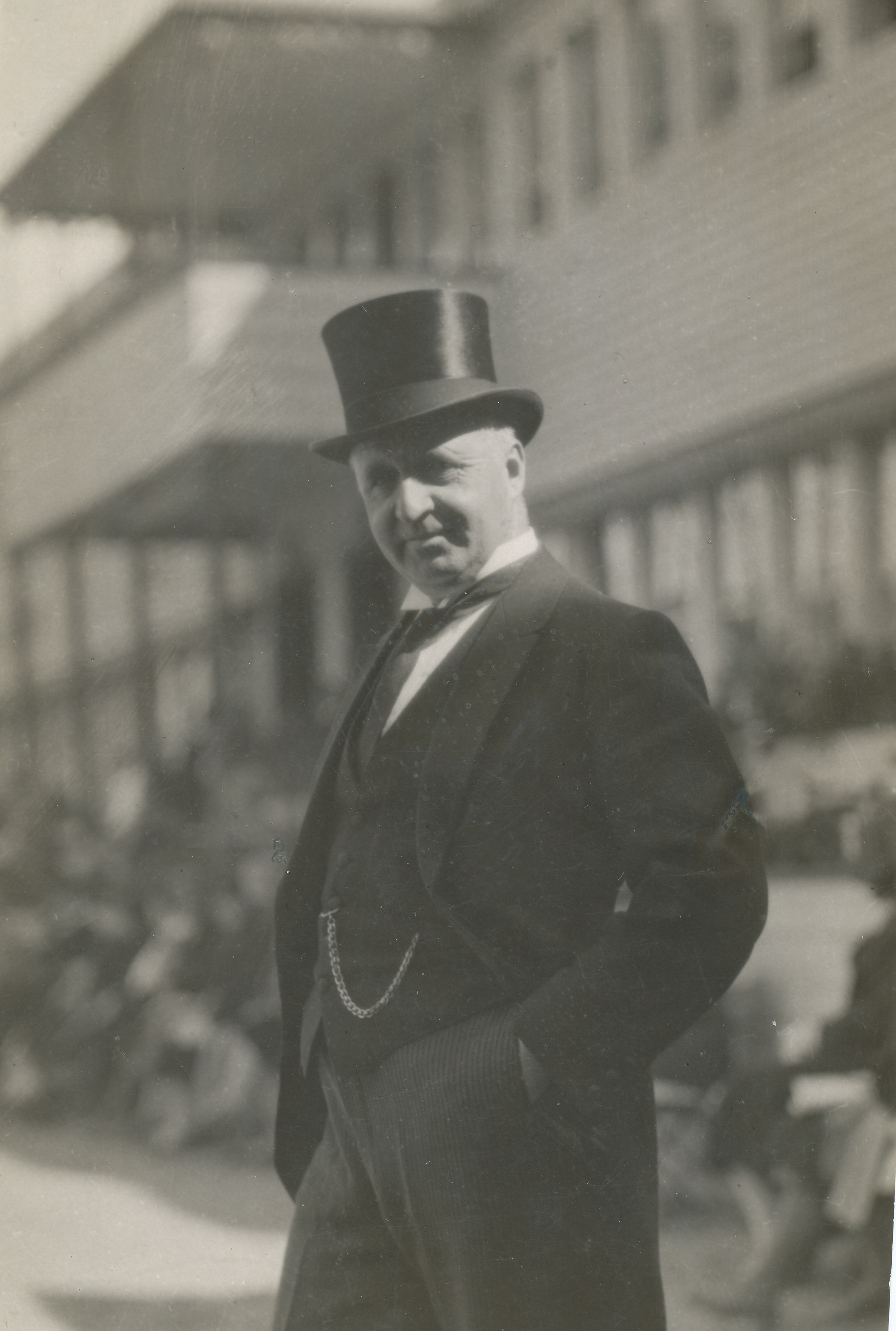 Olav Bergersen (f. 1880), norsk offiser, dispasjør og politiker (H).